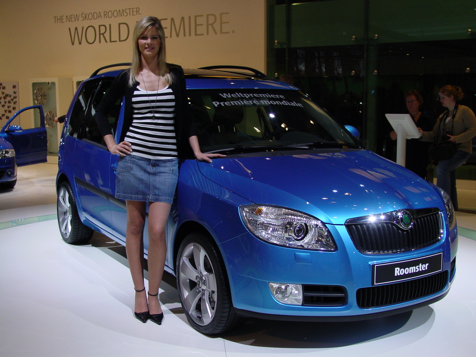 Škoda Roomster, Ženevský autosalon, březen 2006